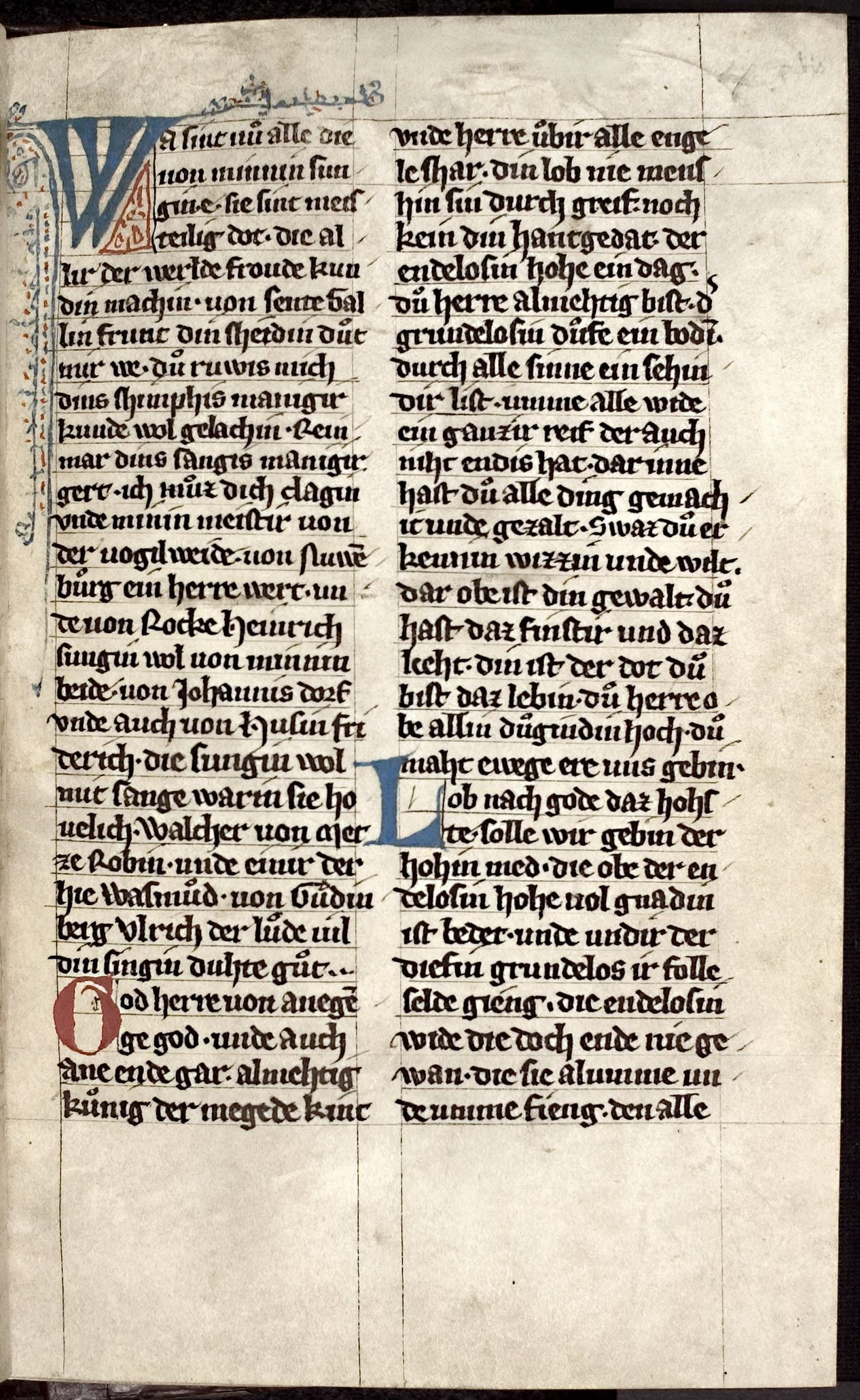 Heidelberger Liederhandschrift cpg 350; Universitätsbibliothek Heidelberg, cpg 350, fol. 44 bis r